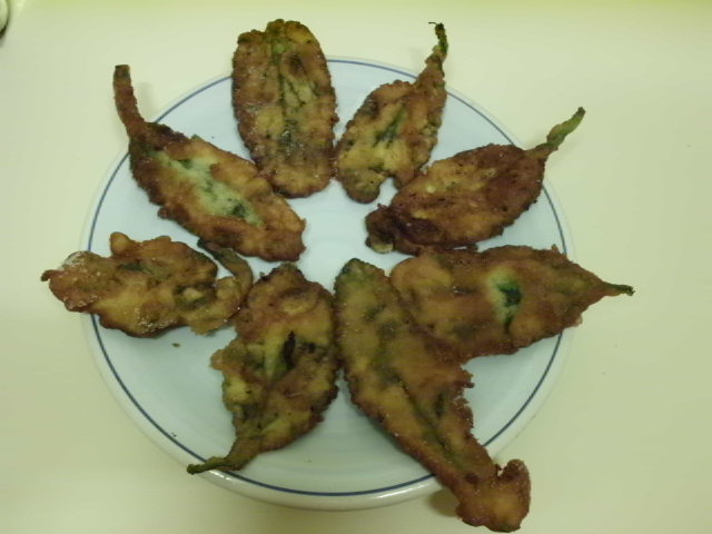 Aragonés: Postre d'o semontano de Balbastro, en Uesca.